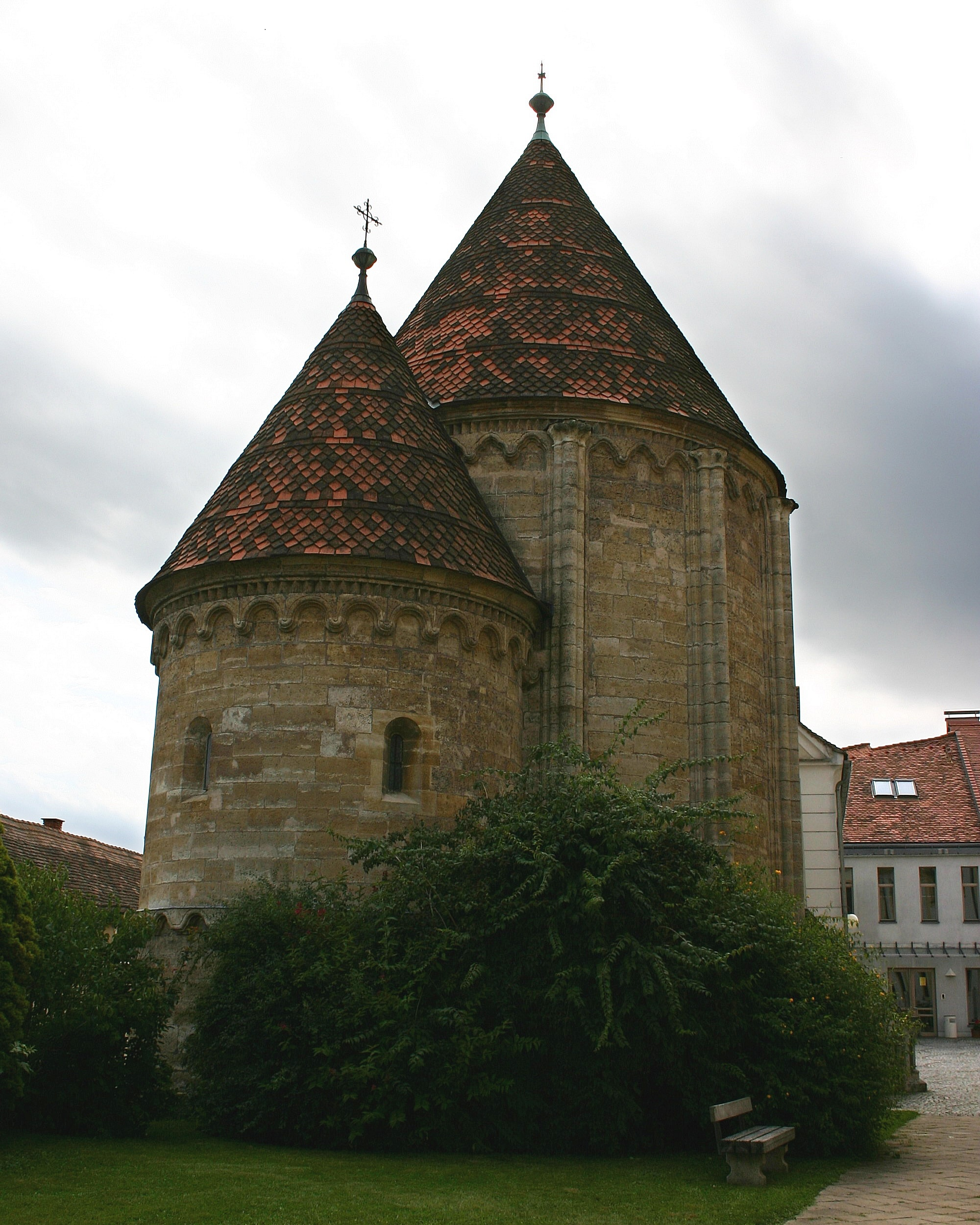 Hartberg Karner